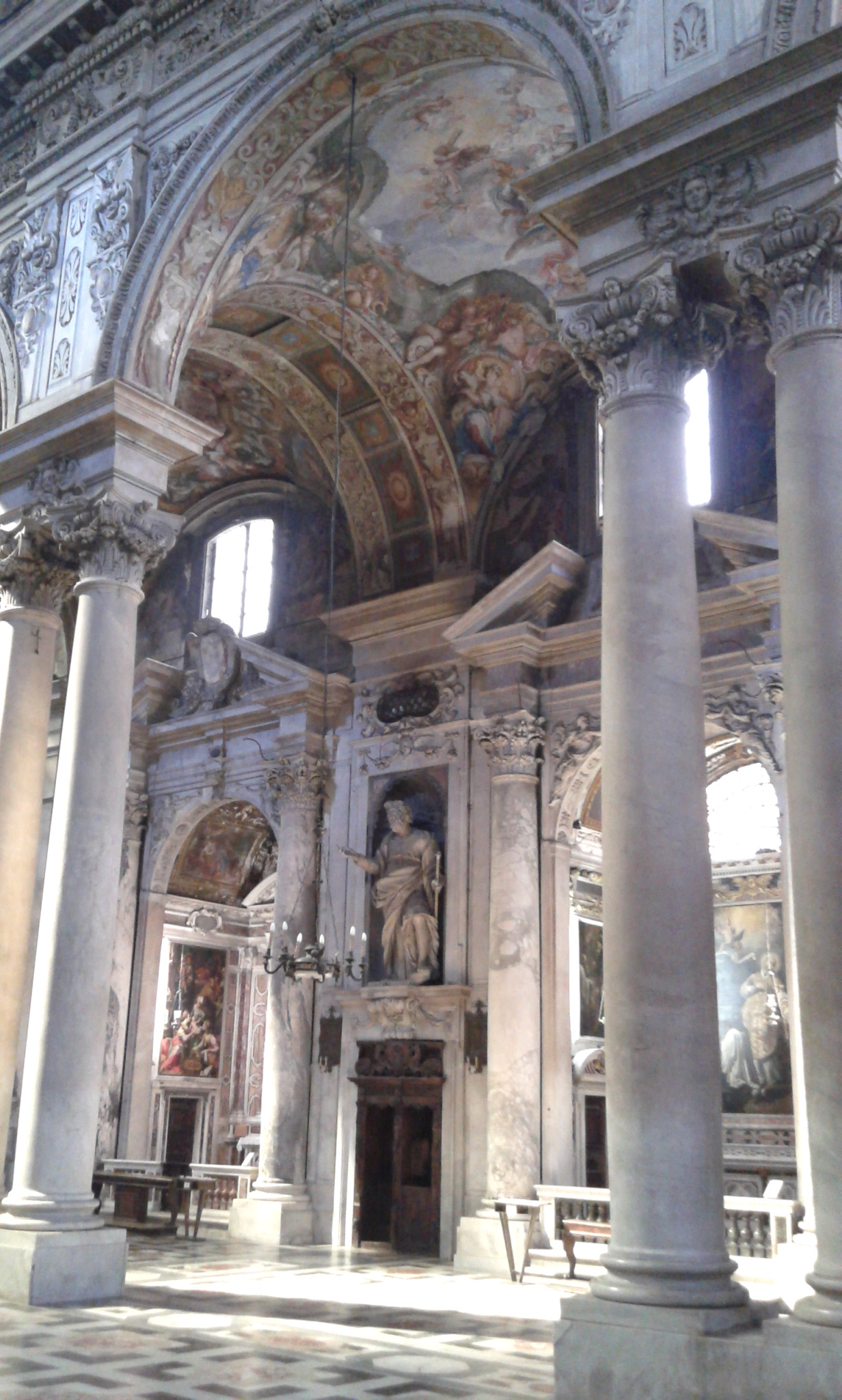 Basilica di San Siro (Genoa) - Interno